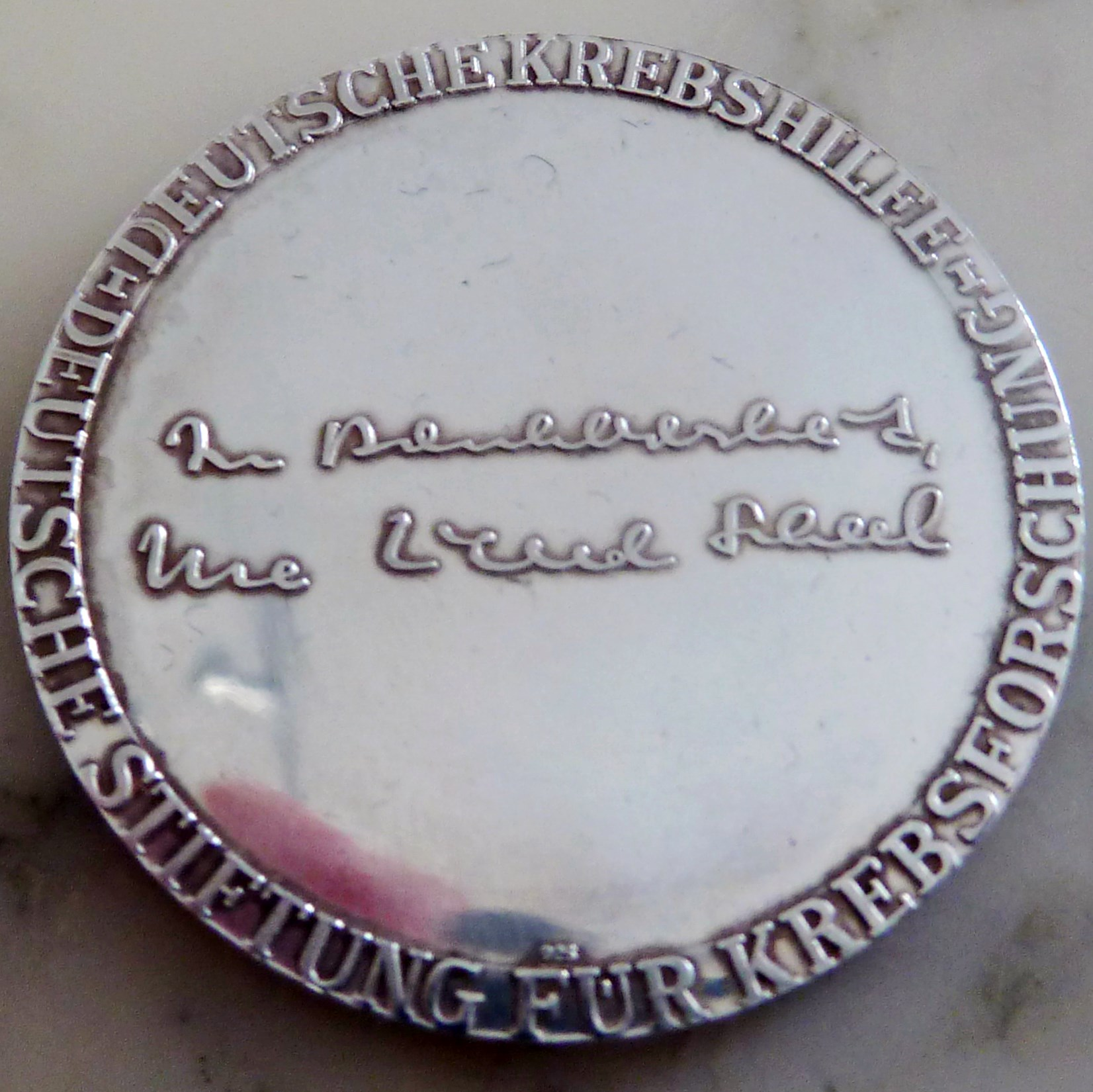 Sibermedaille der Deutschen Krebshilfe (Deutsche Stiftung für Krebsforschung), die Mildred Scheel als Auszeichnung für die Sendereihe "Niemand soll der Nächste sein" 1978 an Claus Spahn in der Villa Hammerschmidt überreichte.